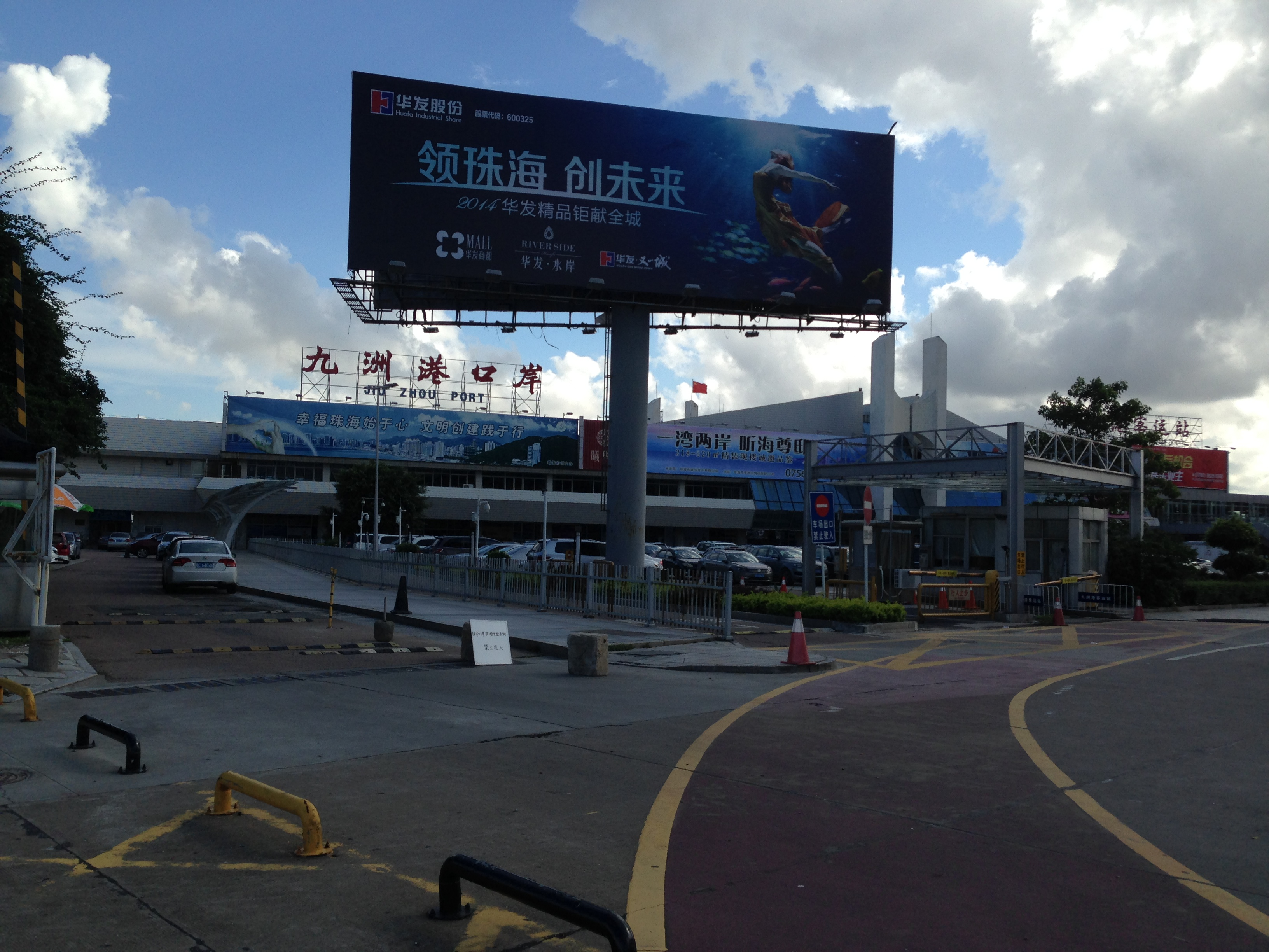 Jiu_zhou_pier